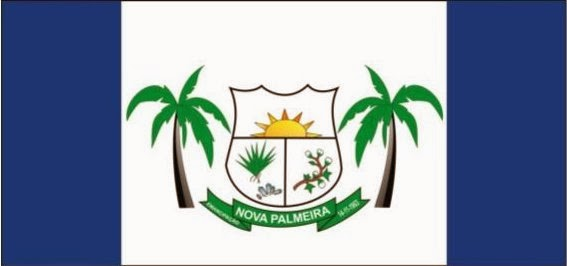 Bandeira Nova Palmeira